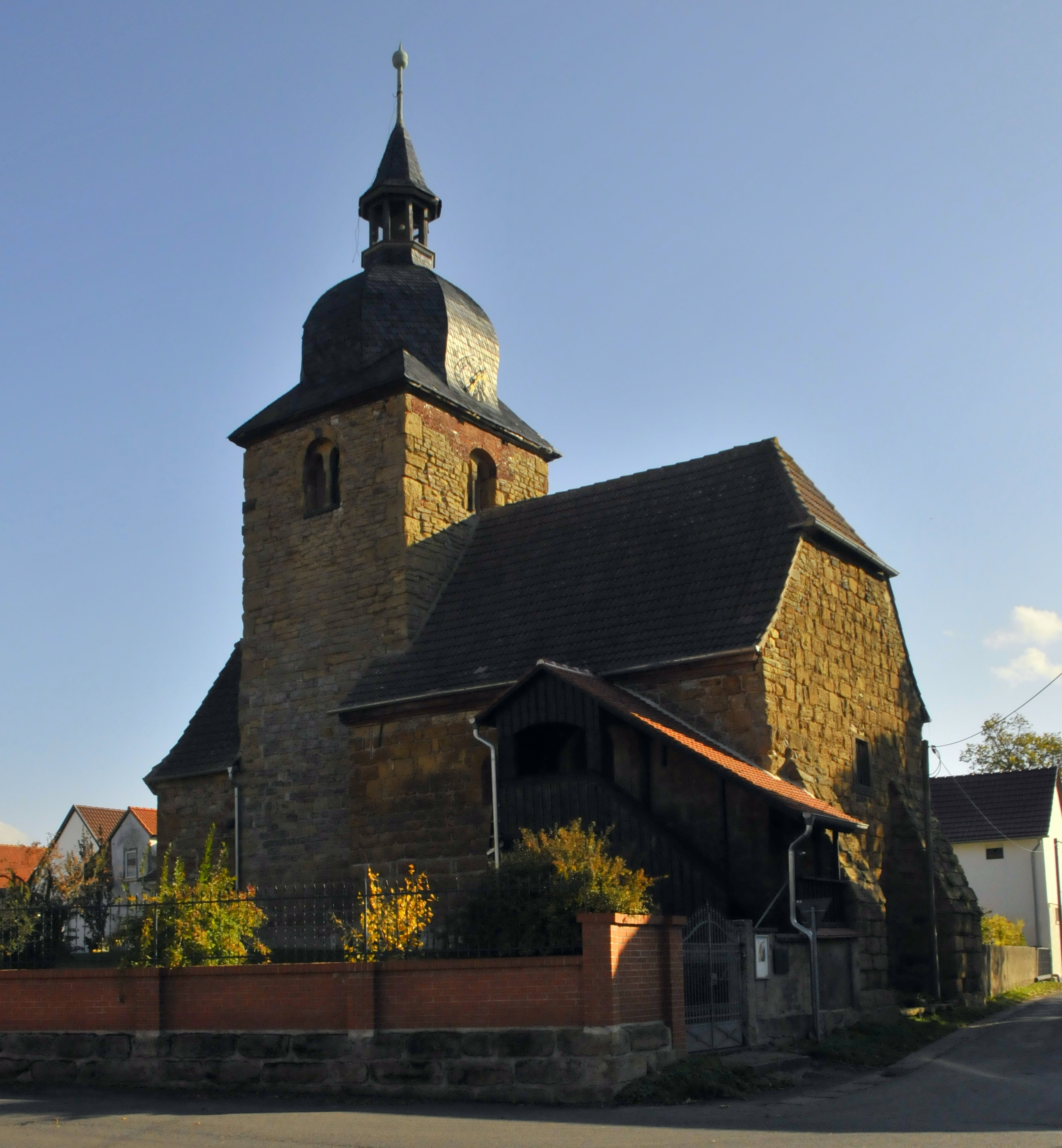 Gottstedt, Kirche